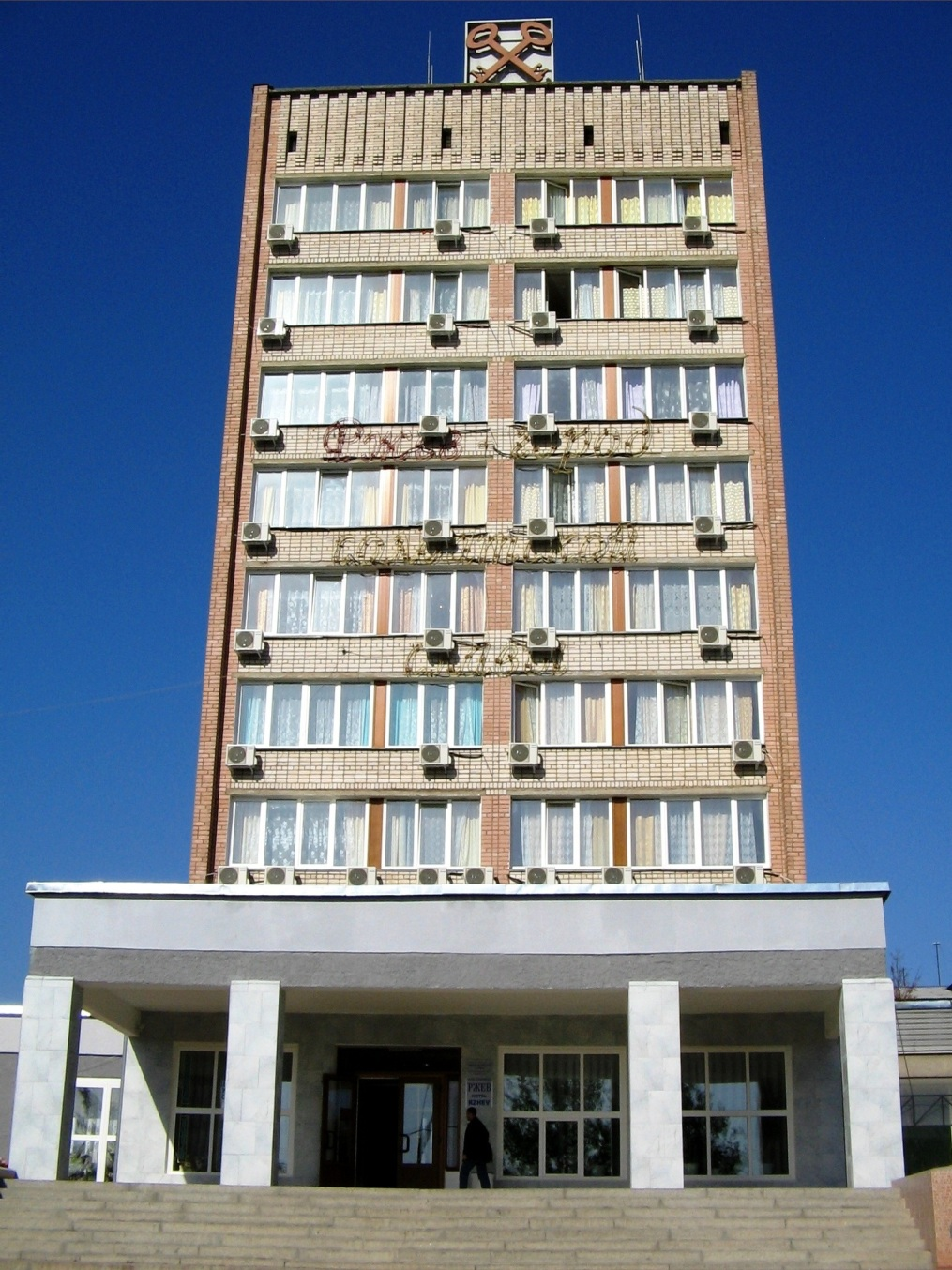 Hotel "Rzhev"